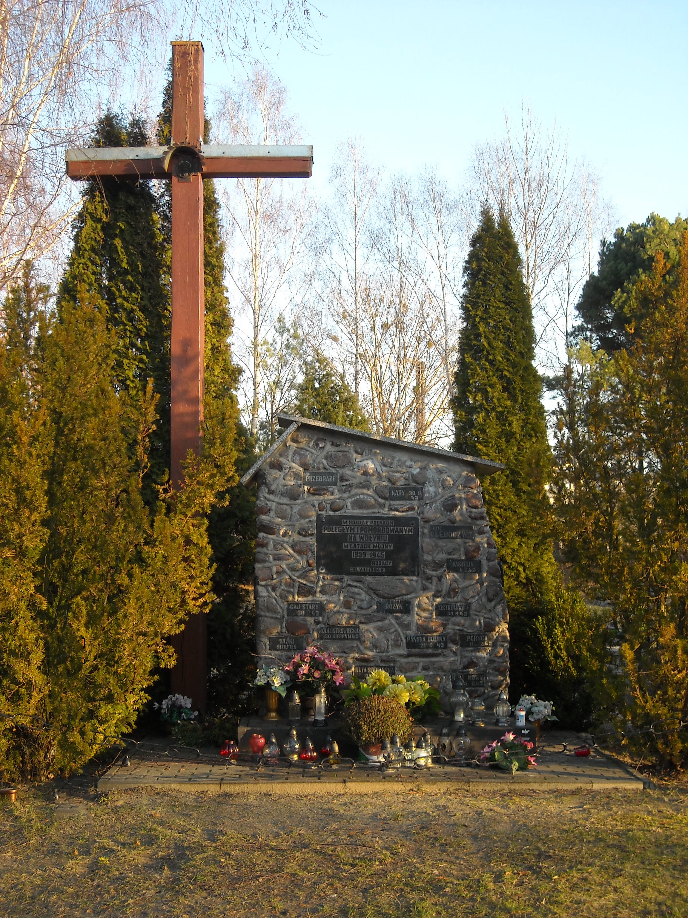 Ruda Huta (pow. chełmski), pomnik ku czci Polaków poległych i pomordowanych na Wołyniu w czasie II wojny światowej (1984 r.)